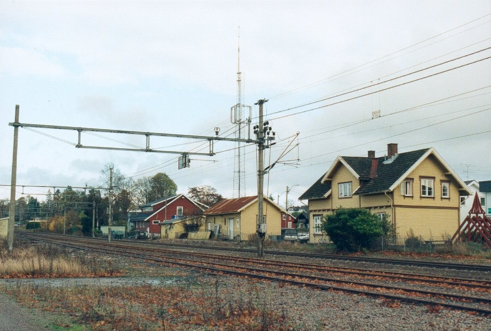 Barkåker stasjon på Vestfoldbanen ca. 1999.